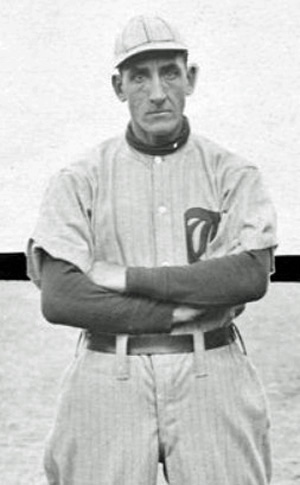 Joe Rickert